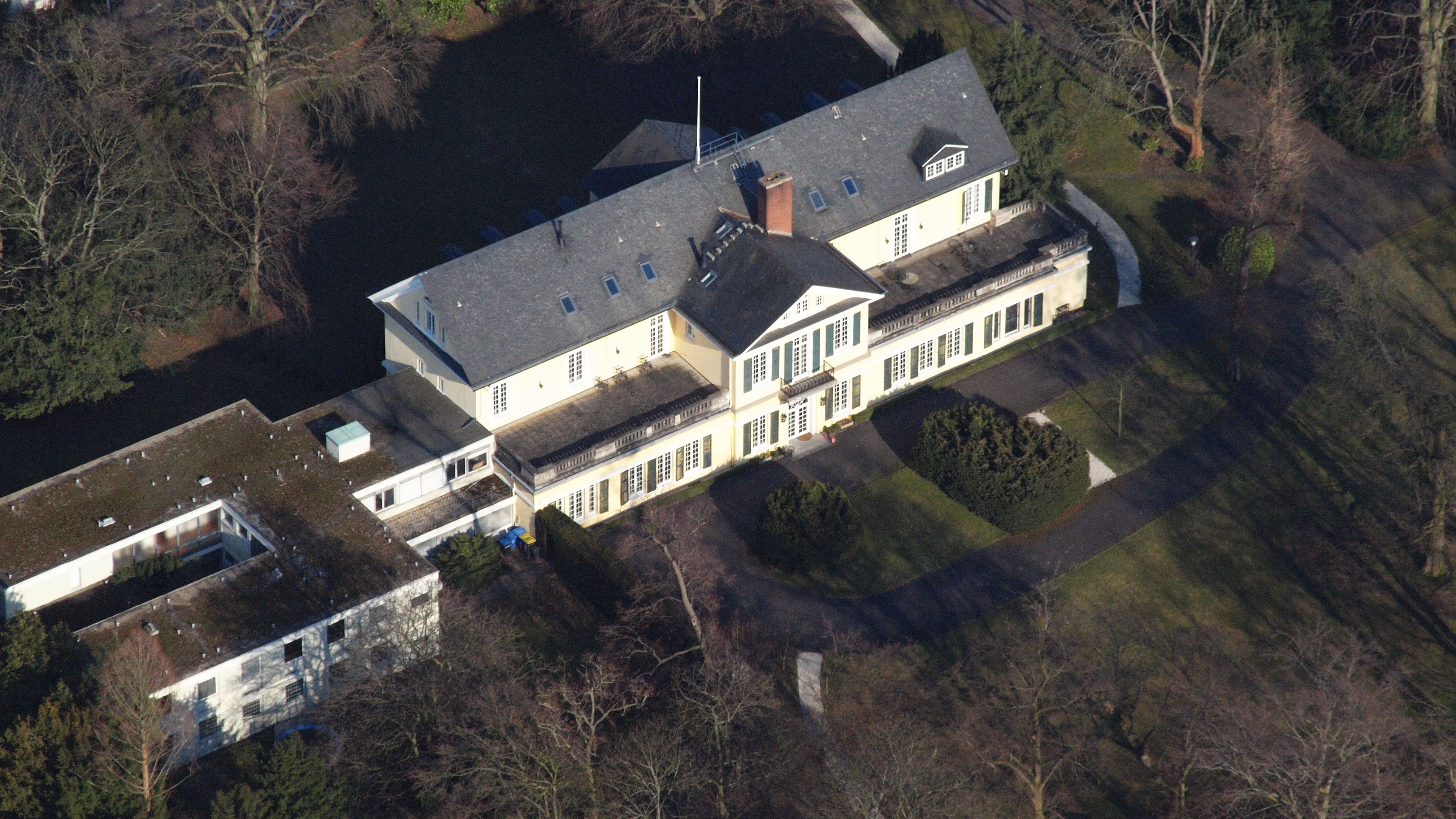 Turmhof in Plittersdorf, Bad Godesberg, Bonn: Luftaufnahme aus nordwestlicher Richtung